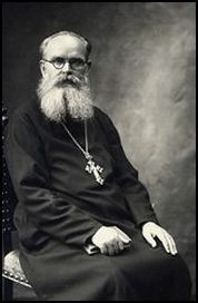 Фабіан Абрантович (1884-1946) - білоруський релігійний і громадський діяч, католицький священик, маріанин